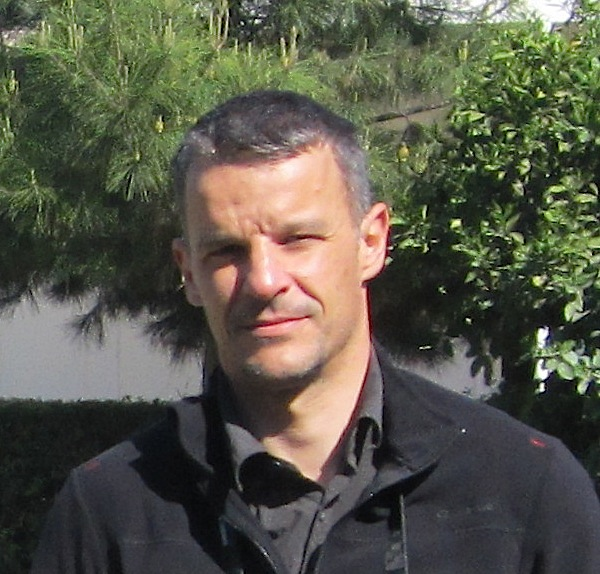 Karlos Zurutuza